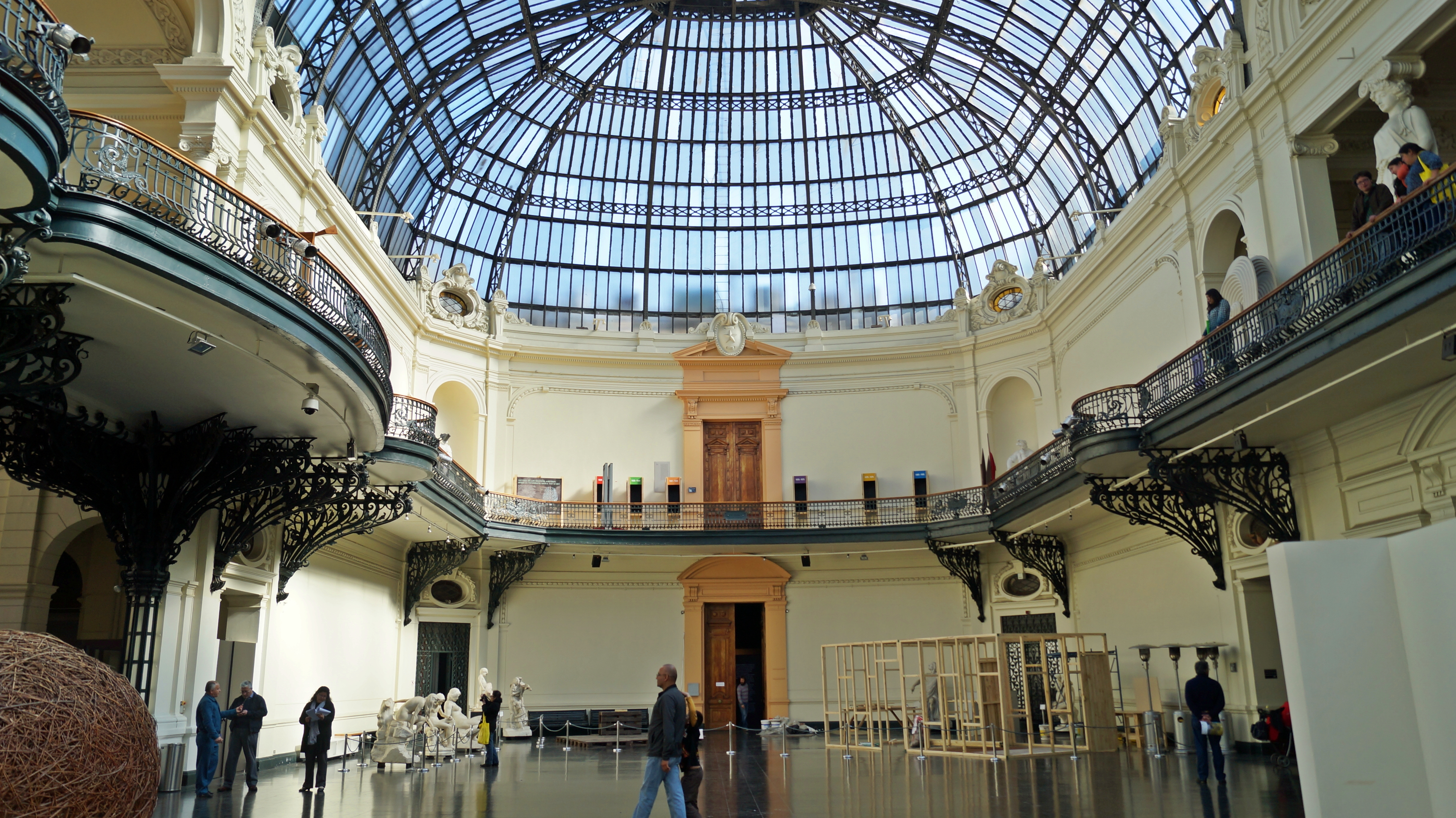 Museo Nacional de Bellas Artes This is a photo of a national monument in Chile: 830